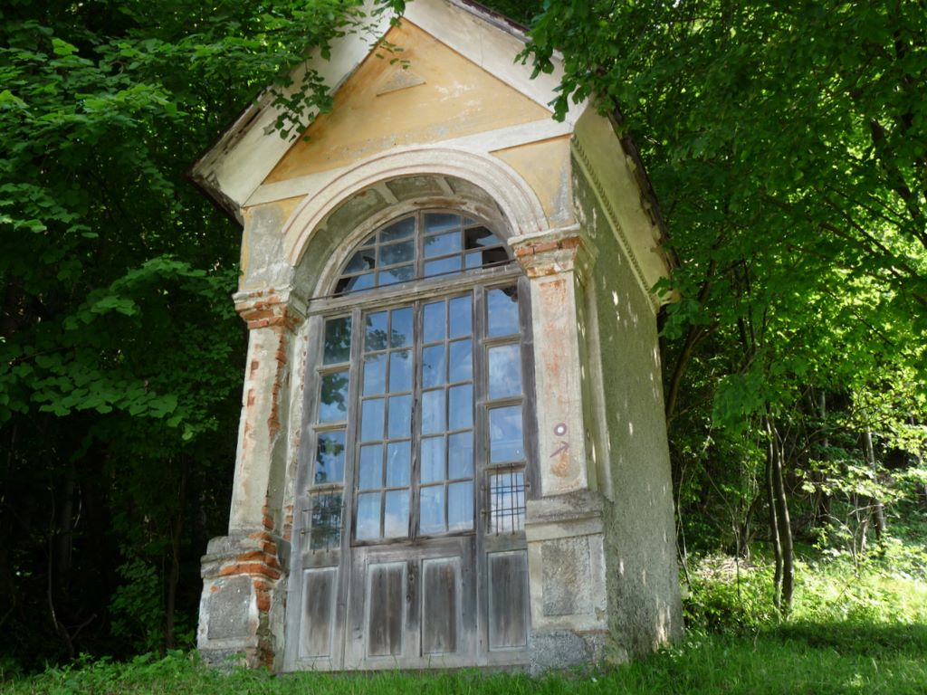 Kapelica v Šemniku